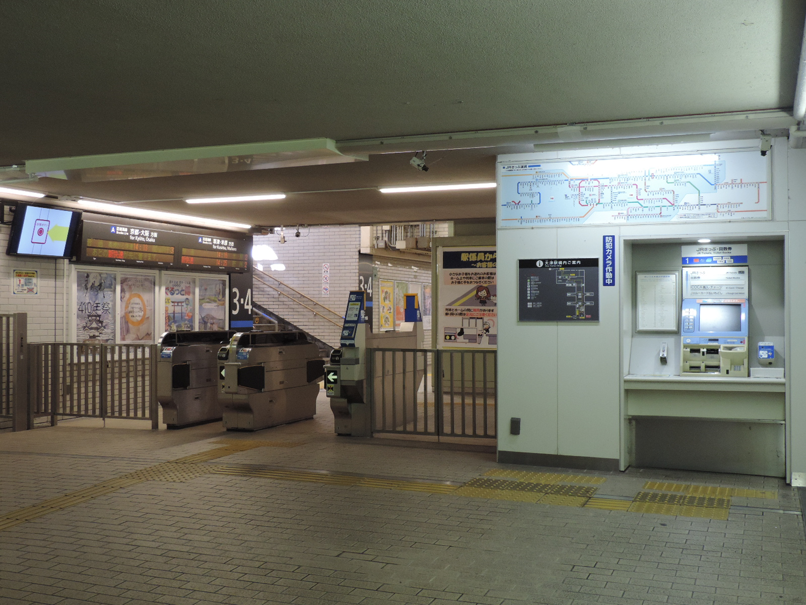 大津駅南口改札。2017年撮影